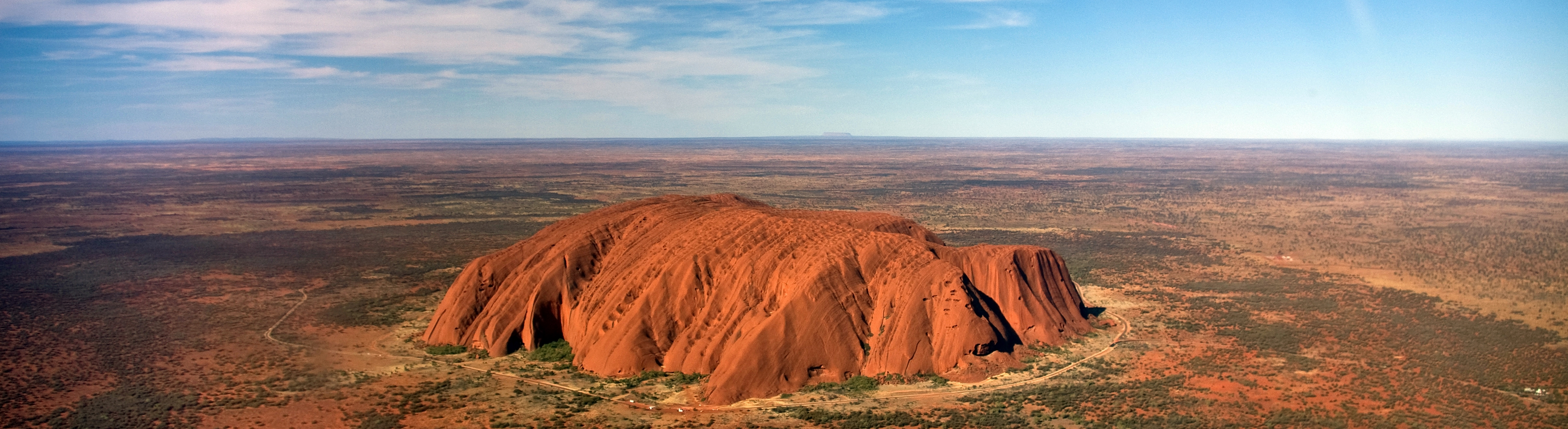 Uluru from a Helicopter